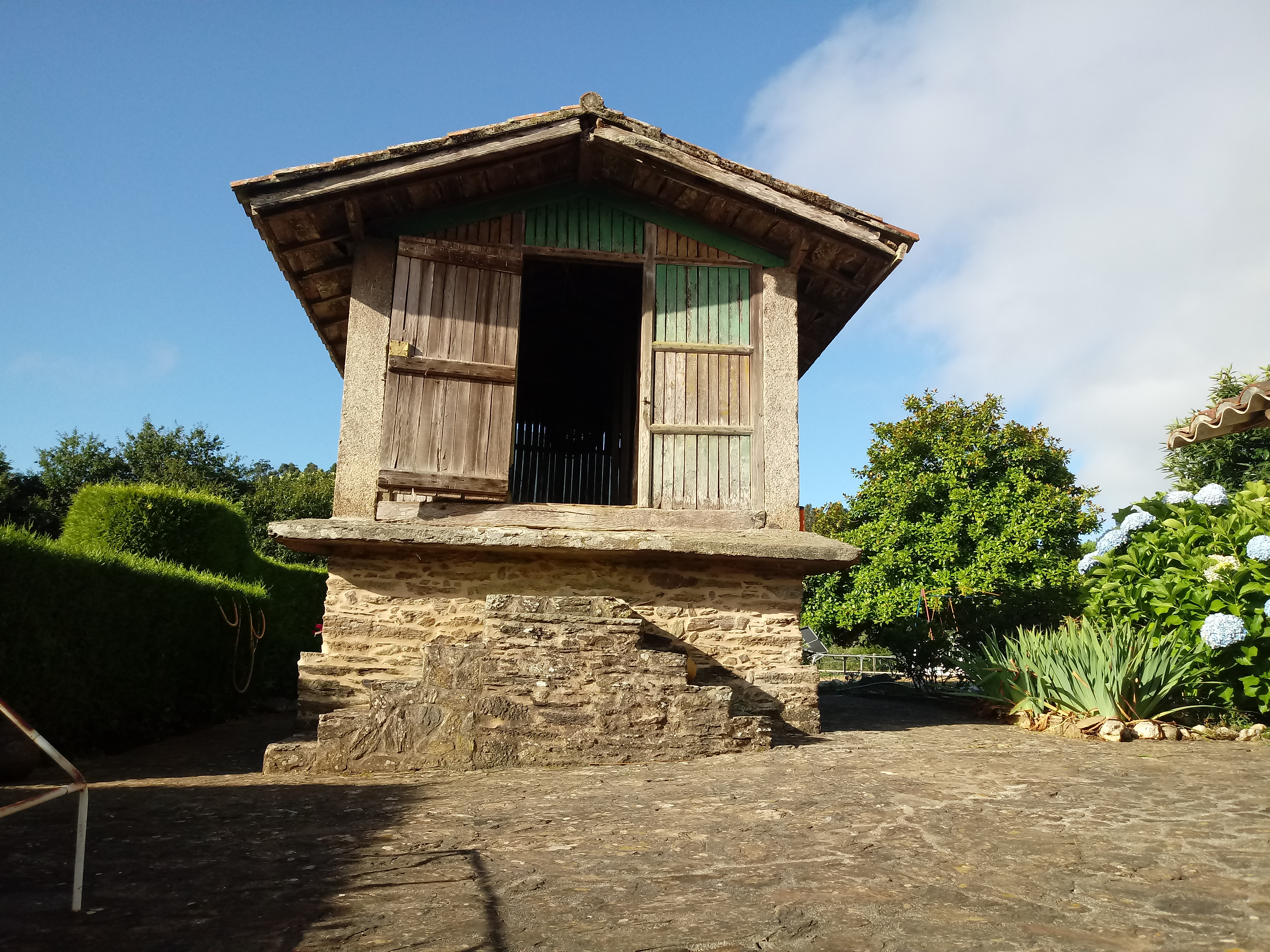 Típico hórreo da área do Pino, de forma rectangular, que conta cuns 18 m². Neste caso é un hórreo sen planta baixa para aperos, como é habitual na zona. Conta cun patín de dúas escaleiras, con catro e cinco chanzos, respectivamente.